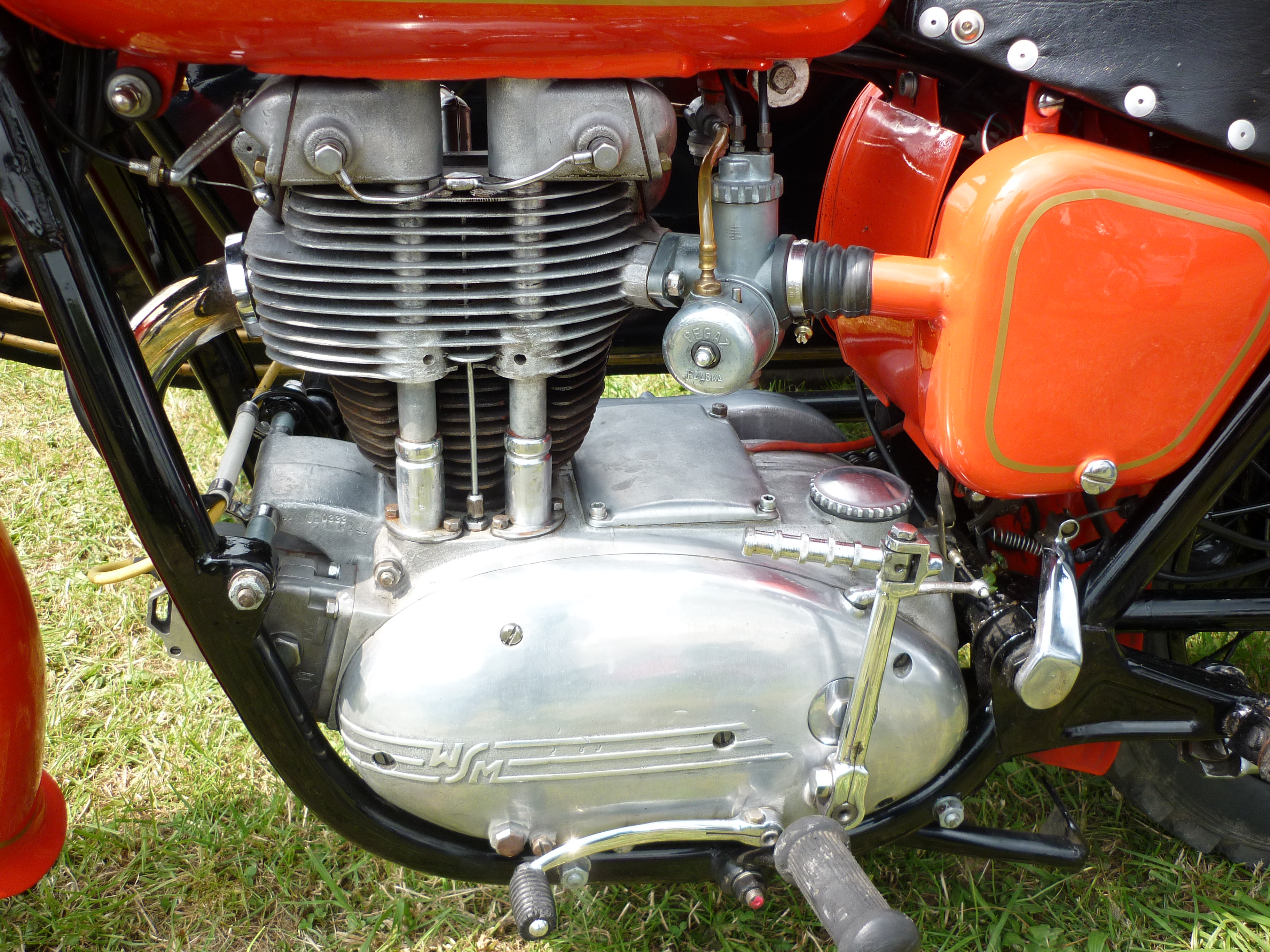 Junak Motor mit dem seltsamen Vergaser